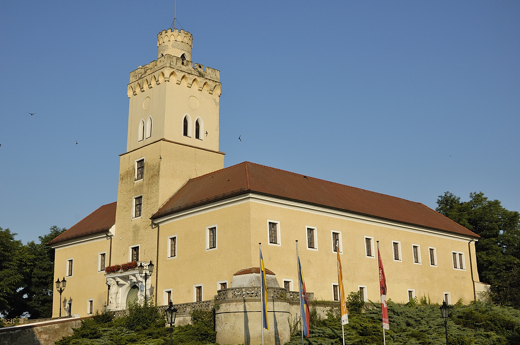 Dürnkrut, castle